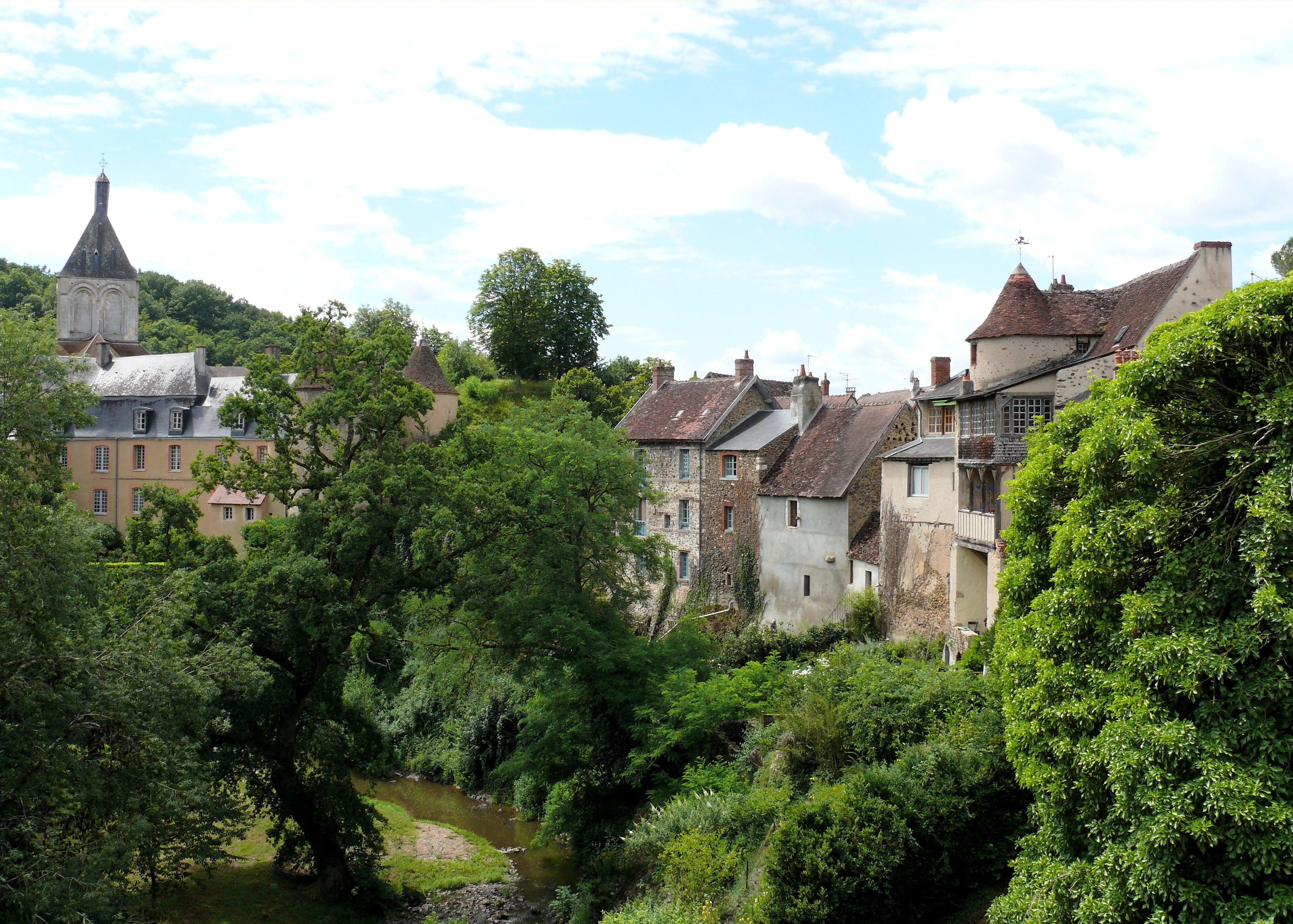 Gargilesse-Dampierre - La ville, le château et l'église au-dessus de la Gargilesse